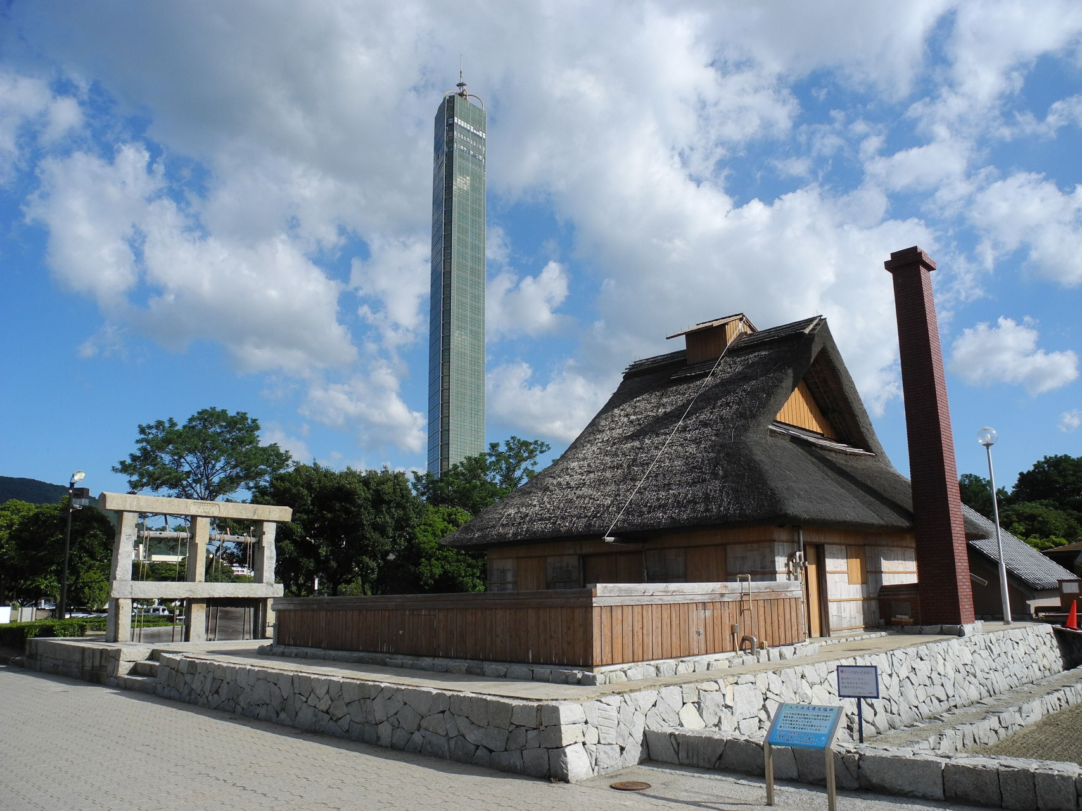 復元塩田の釜屋とゴールドタワー ： 塩田などに関する資料館で復元塩田に隣接する。 - 日本国香川県宇多津町（うたづ臨海公園内）。